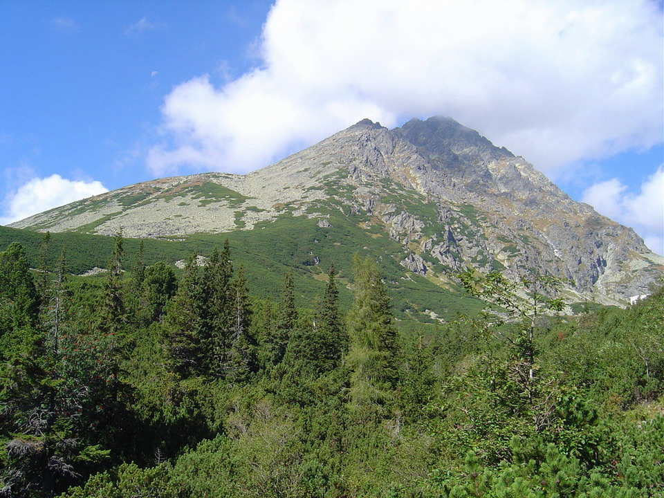 Gerlachovsky stit from Velicka dolina